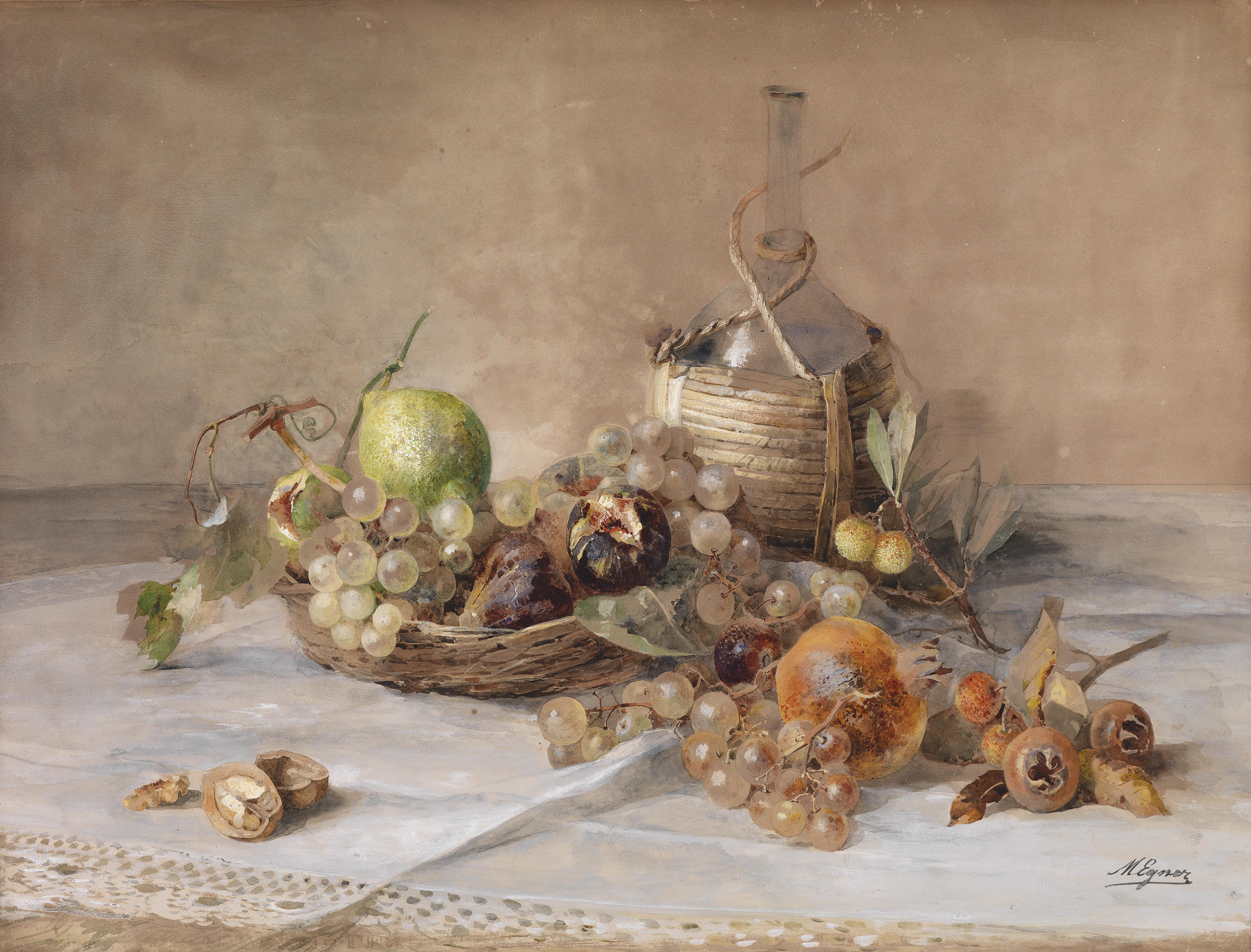 Stilleben mit Obst und Chiantiflasche